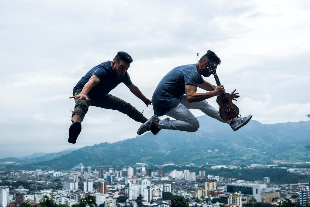 Juanito y Lucho saltando sobre la ciudad de Pereira, donde se conformó la banda.